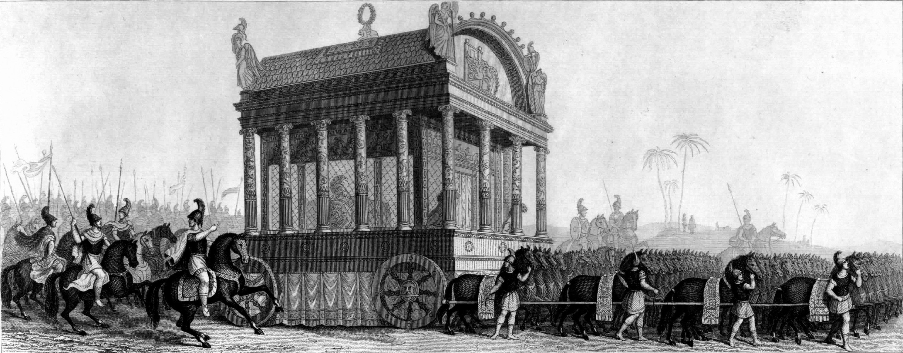 Alexander old drawings